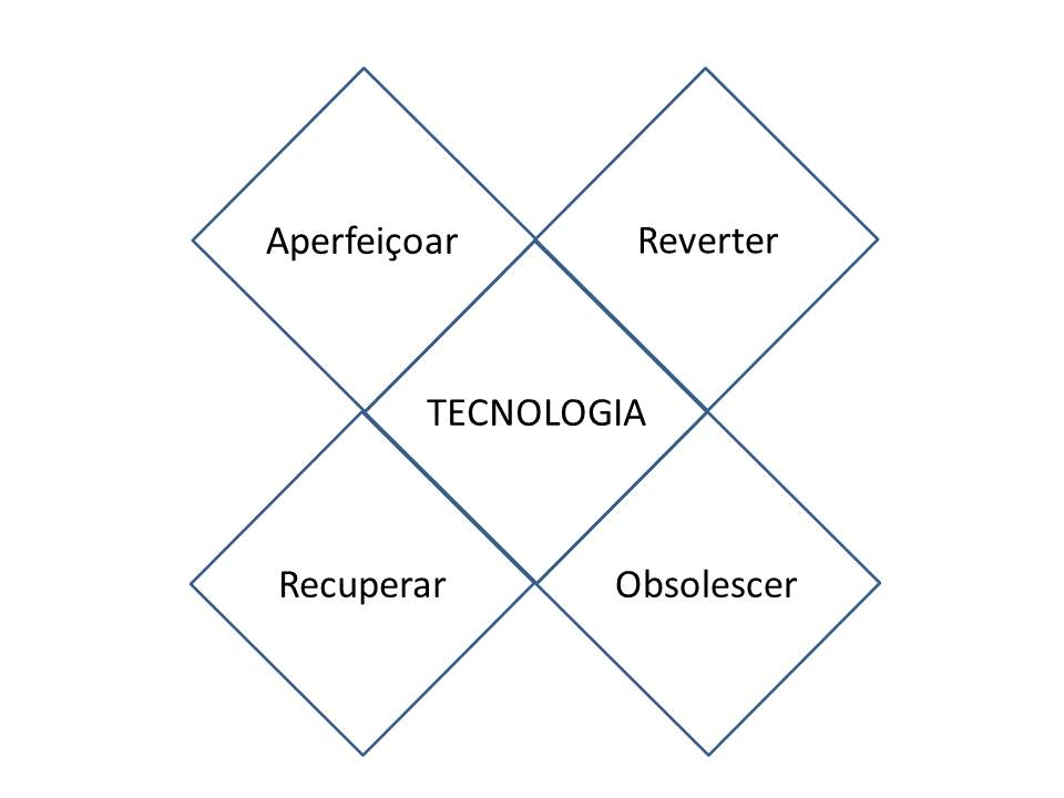 Diagrama da Tétrade criada por Marshall McLuhan, para explicar as Leis da Mídia